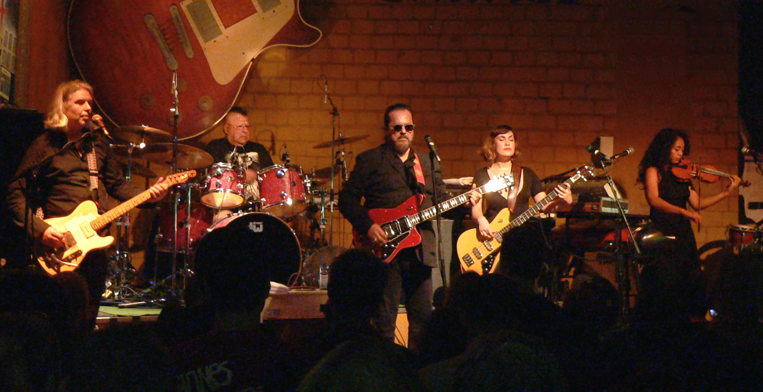 Tito & Tarantula 2016, von links nach rechts: Marcus Praed, Johnny „Vatos“ Hernandez, Tito Larriva, Lolita Carroll Larriva, Allyssa Grace